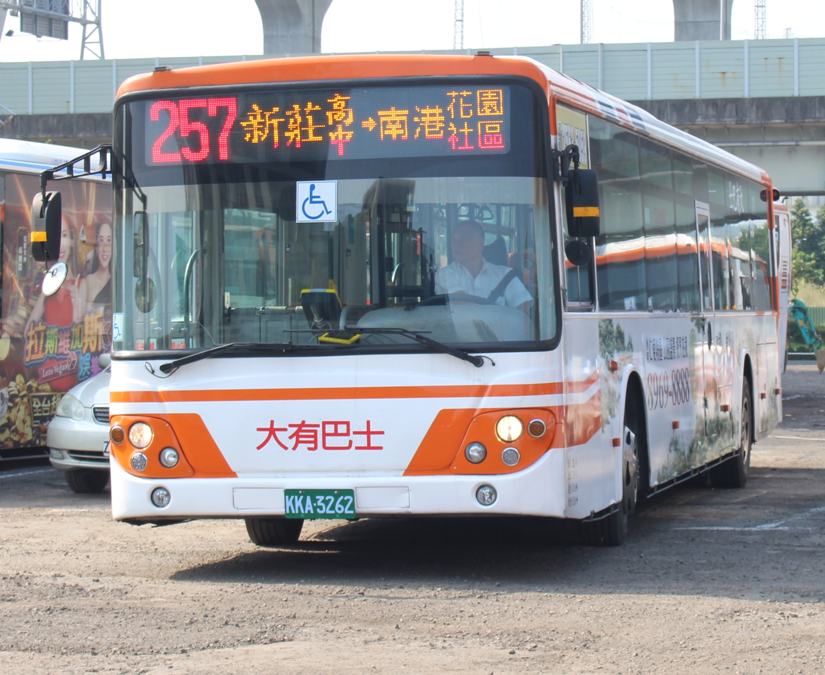 大有巴士 KKA-3262 257